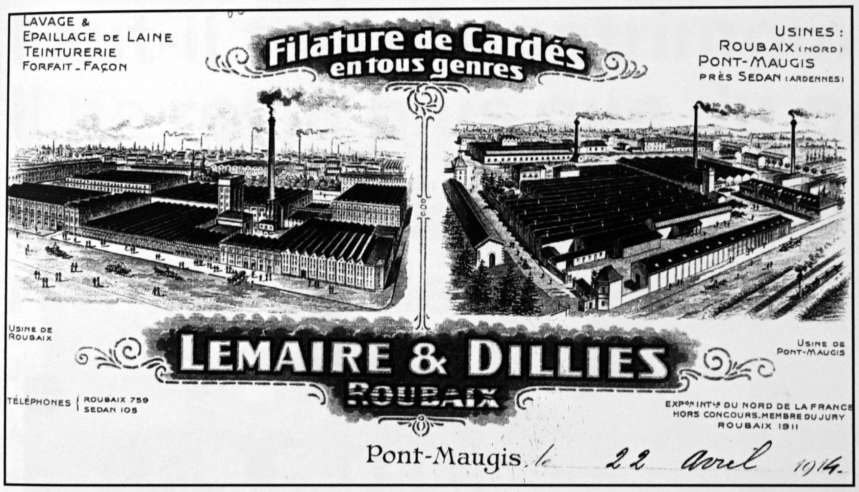 vue ancienne.